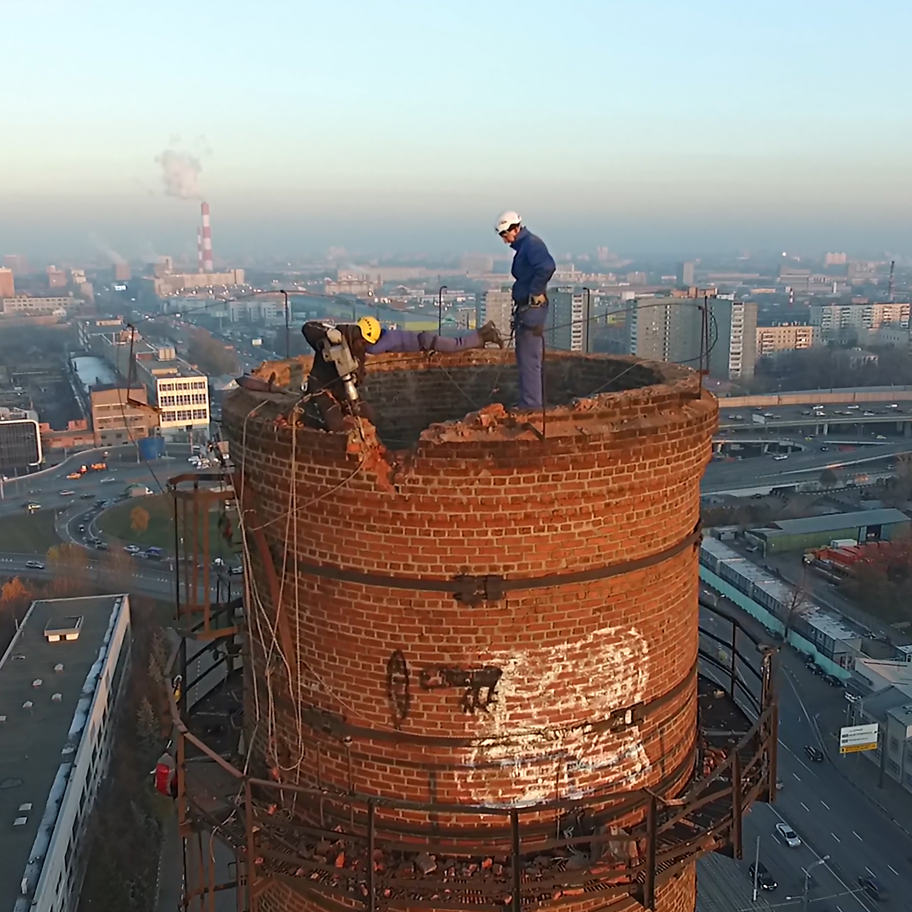 Ручной демонтаж 80-метровой дымовой трубы ММЗ «Серп и Молот» г. (Москва). Демонтажные работы проводит ГК «КрашМаш»